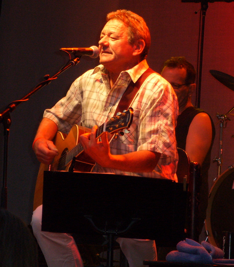 Wolfgang Ambros live in Imst (Austria 3 Konzert). Fotograf/Zeichner: Hannes Schneidermayer, Heanz Datum: Freitag, 30. Juni 2006